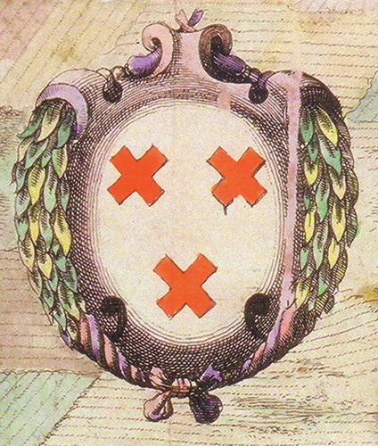 17e eeuws wapen van Breda Komt uit 'Breda in kaart' boek uitgegeven door het Breda's museum.